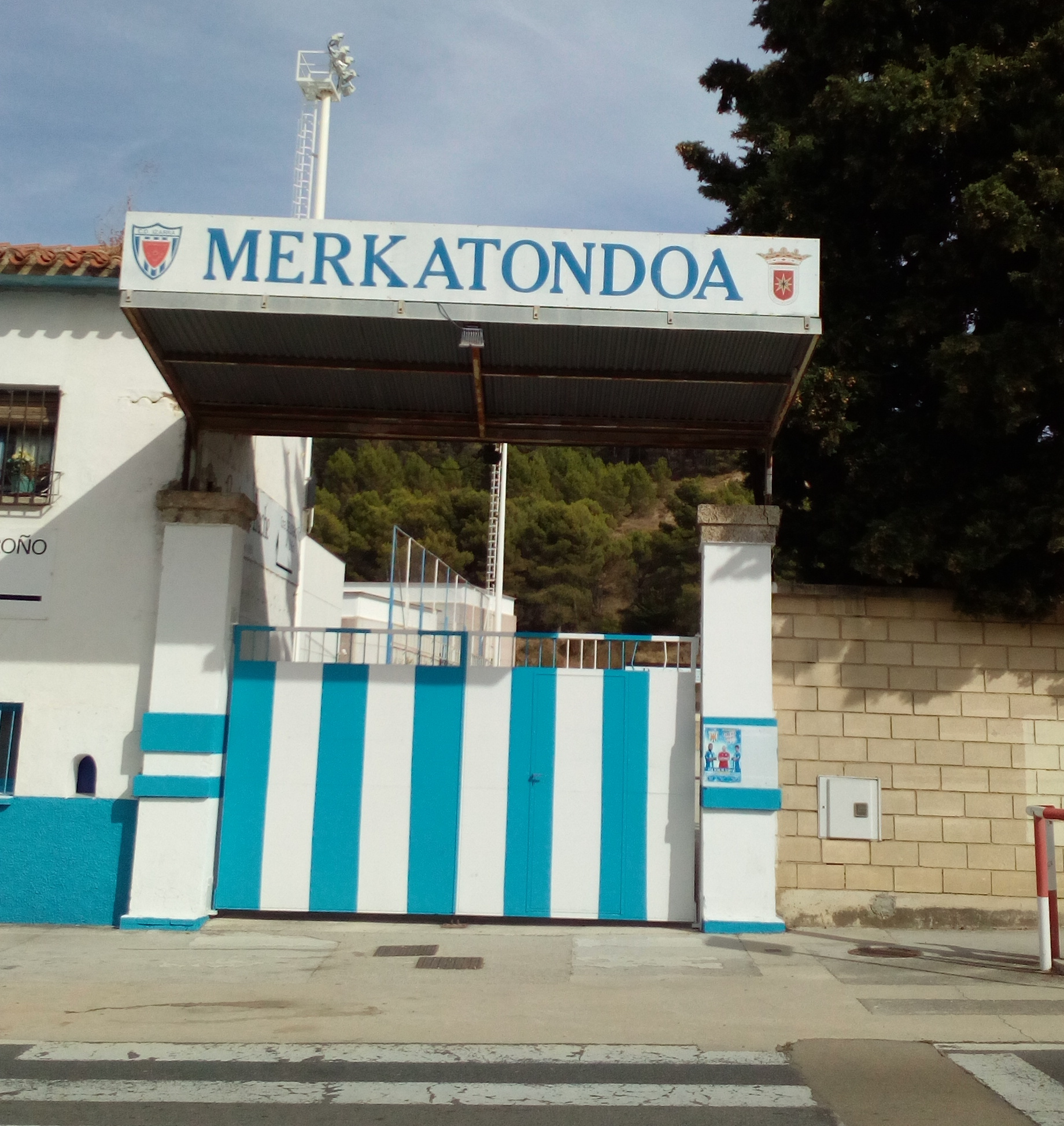 Entrada Merkatondoa